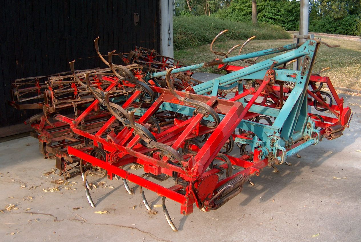 Saatbettkombination mit Federzinkenegge in Transportstellung